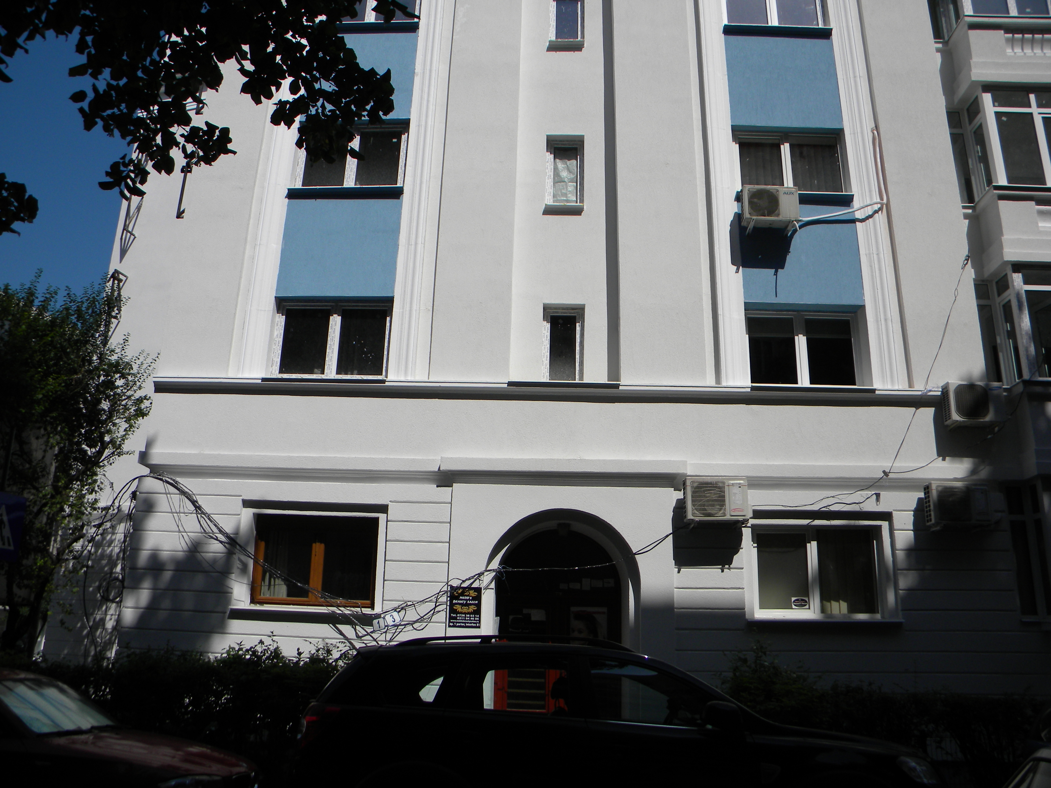 Bucuresti, Romania, Imobilul nr. 1-3 de pe Str Naum Ramniceanu; B-II-m-B-19520 si B-II-m-B-19522